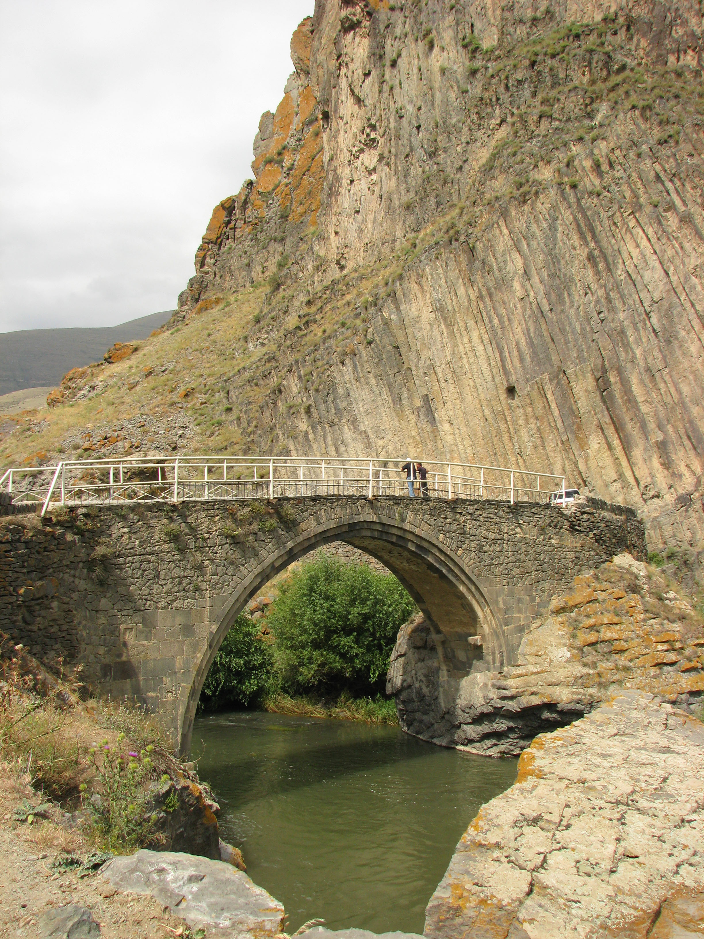 Մելիք Թանգի կամուրջը Որոտան գետի վրա 78/3